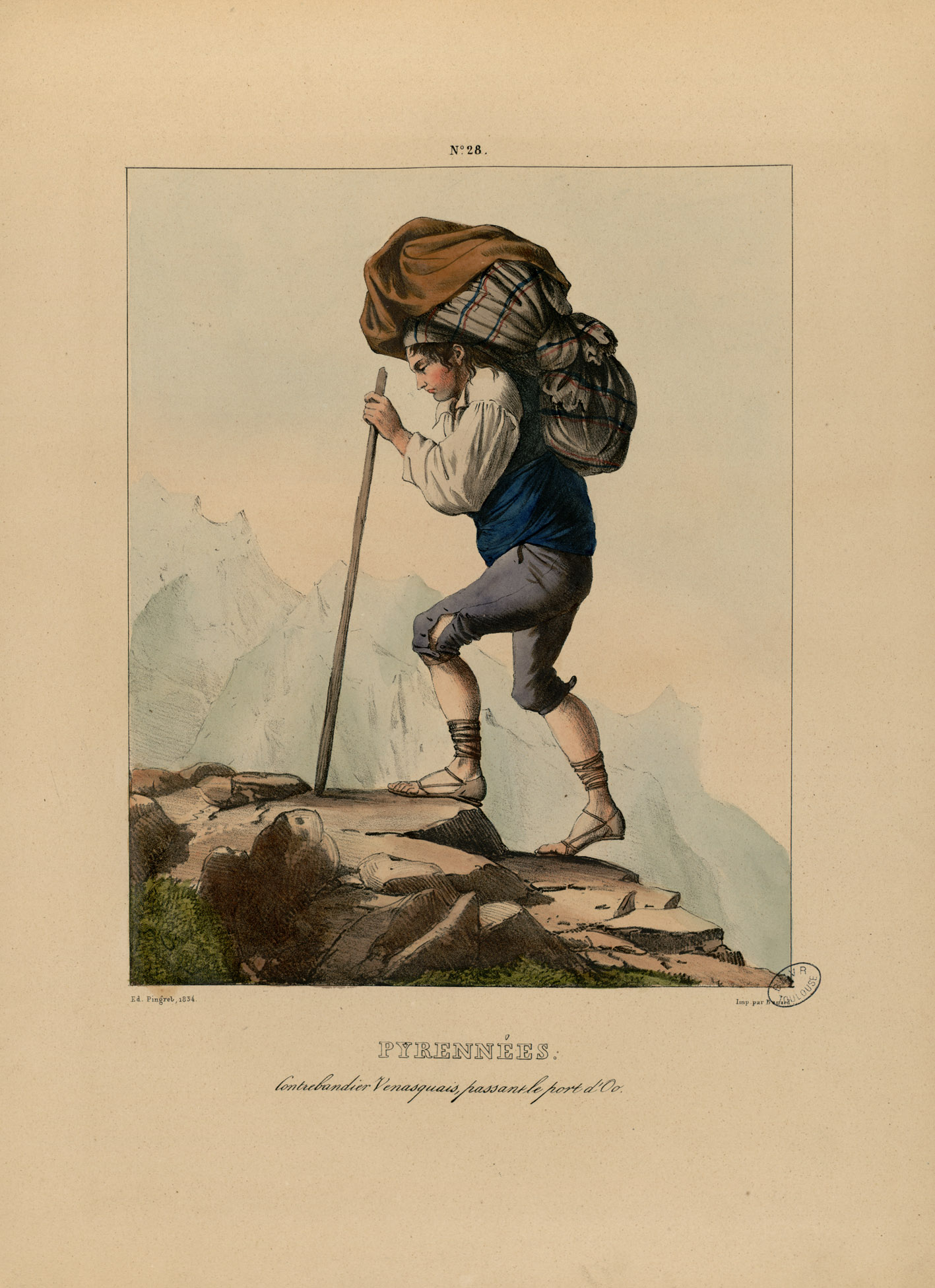 Ancely, René (1876 - 1966). Possesseur